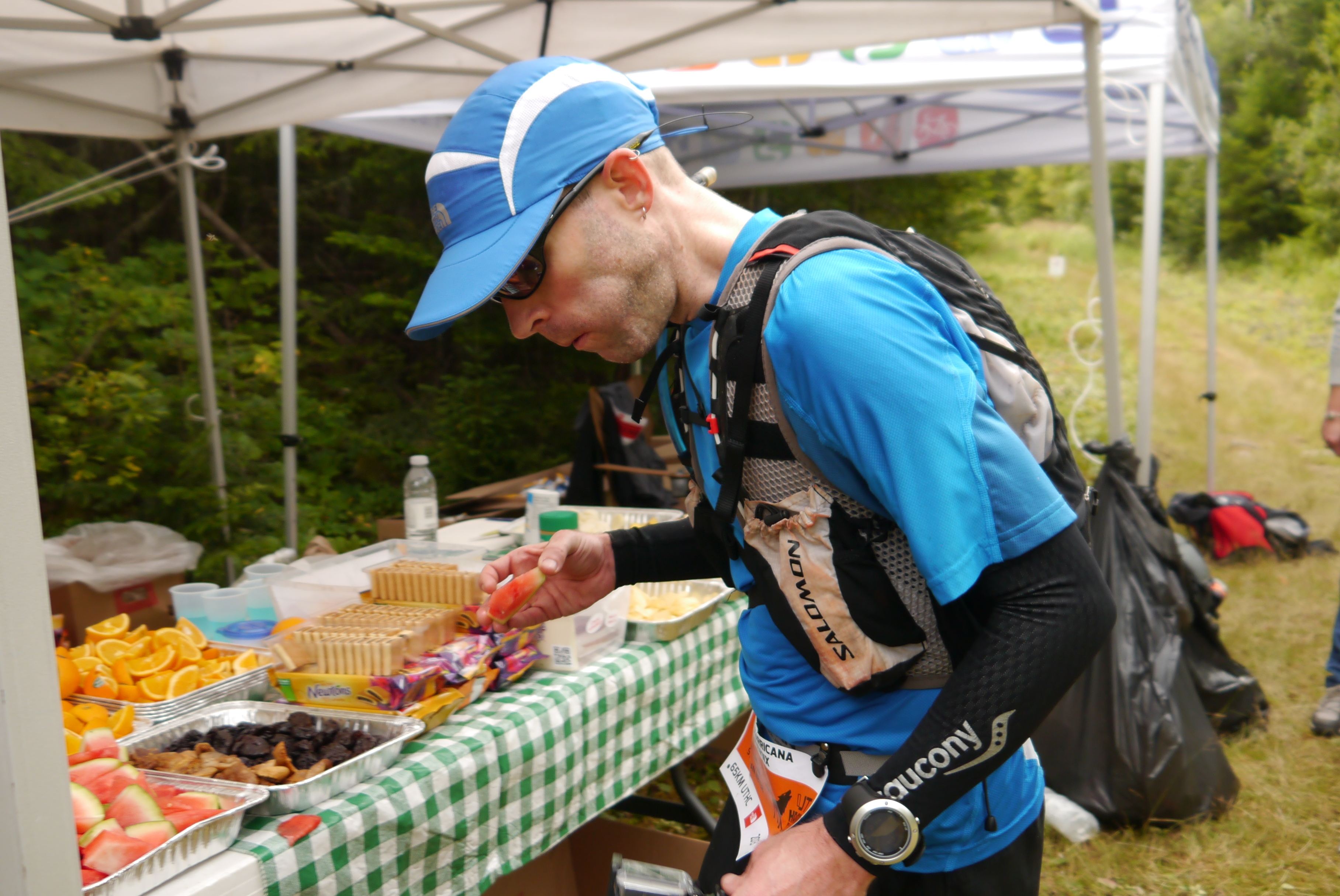 ravito